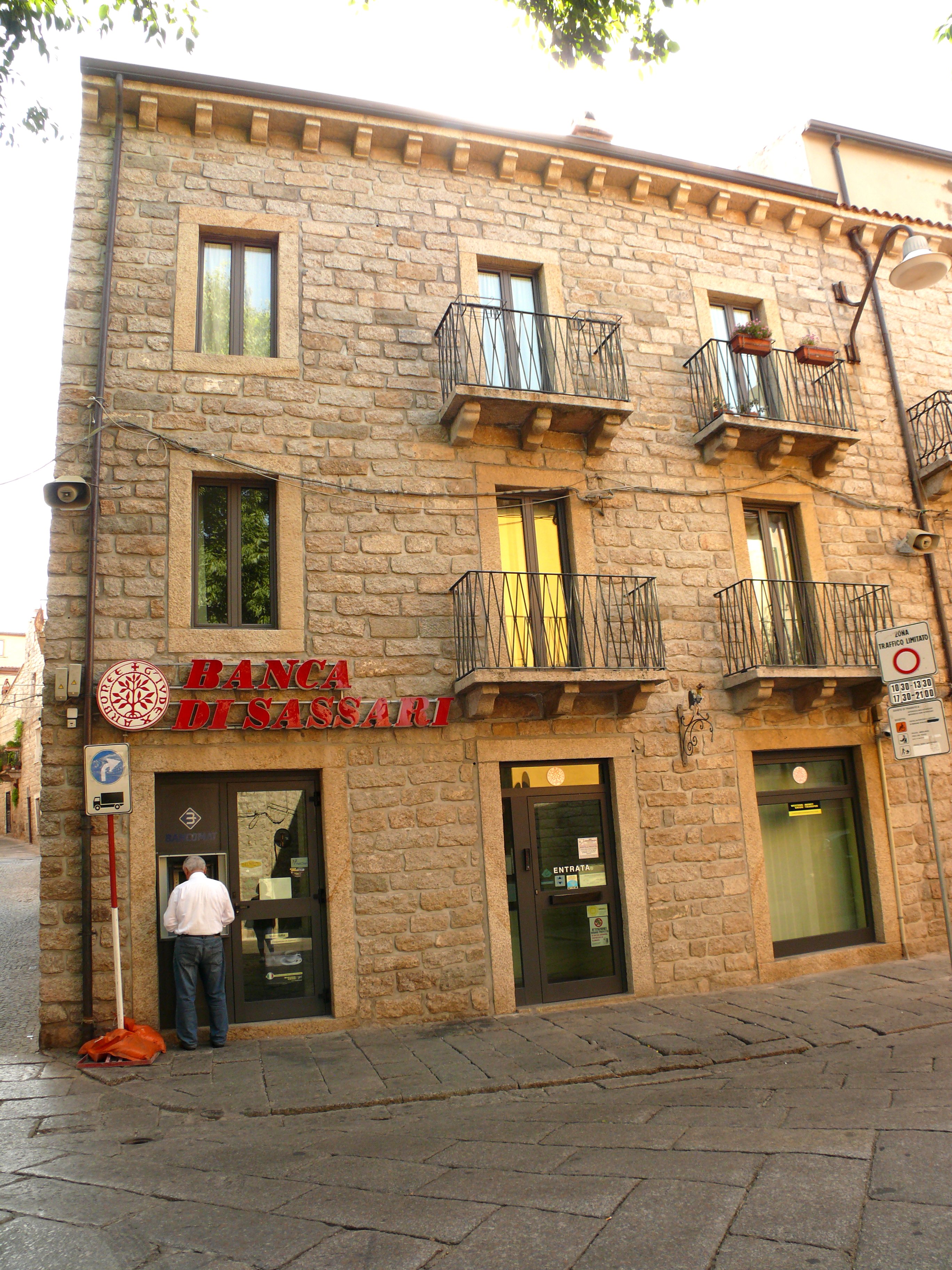 Filiale banca di sassari a Tempio Pausania